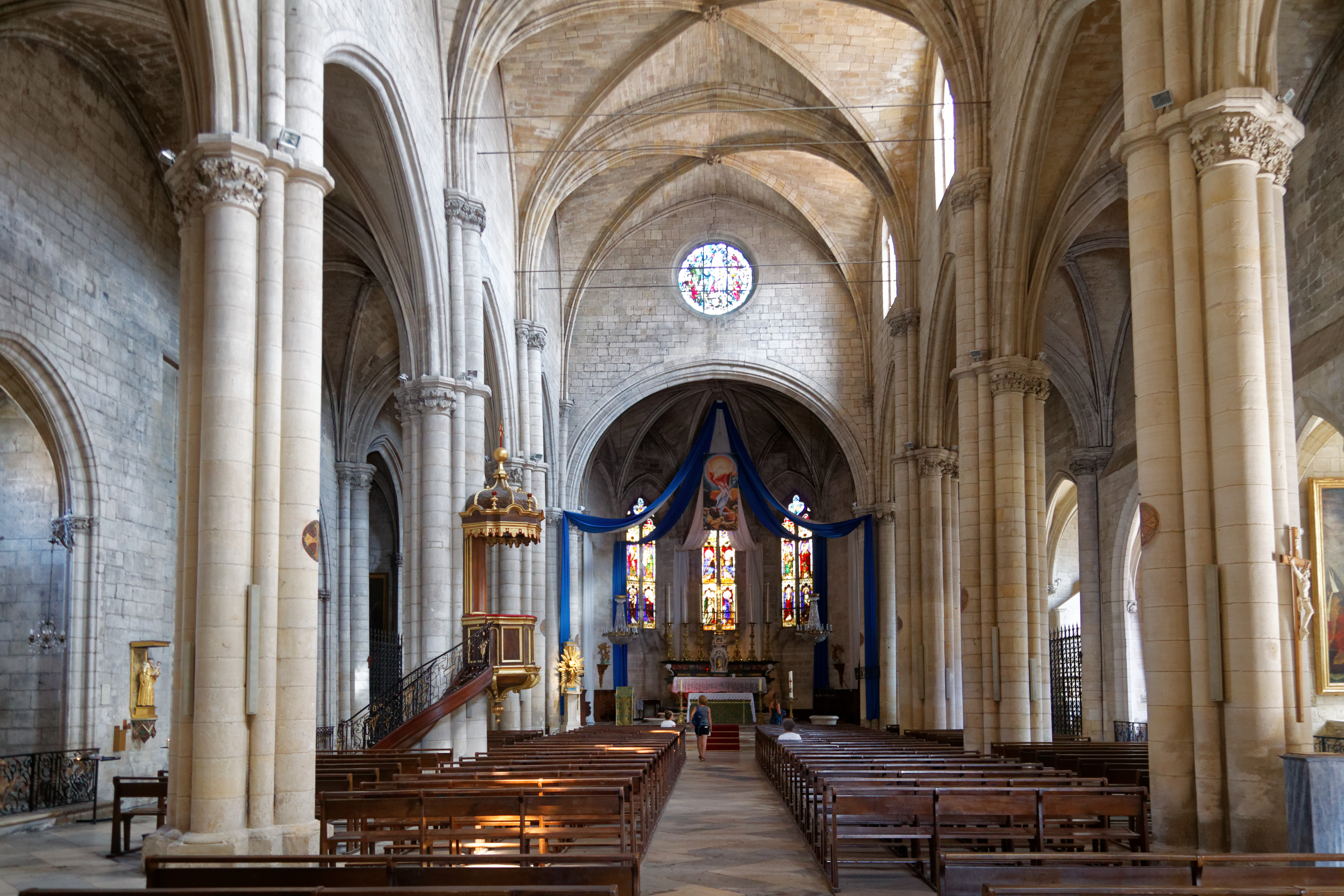 Église Sainte-Marthe in Tarascon